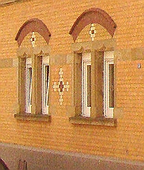 Ausschnitt aus Hn-boeck-eppinger51.jpg